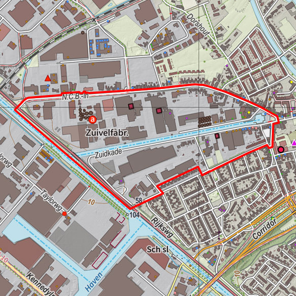 Topografische kaart van bedrijventerrein de Oude Haven in Veghel. Resolutie: 400 pixels/km. Kaartbeeld samengesteld uit de open geodata van de Top10NL en Top25namen (Kadaster), Creative Commons-BY licentie. Gebouwvlakken uit open geodata BAG extract. Wegen uit de OpenStreetMap, OpenStreetMap community. Reliëfschaduw uit de Actuele Hoogtekaart AHN2. Samenstelling en kleurenschema: Jan-Willem van Aalst, met QGIS. Zie ook de Legenda.